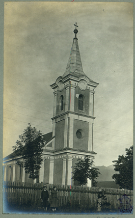 Adler - Biserica greco-catolică din Petroşani, jud. Hunedoara